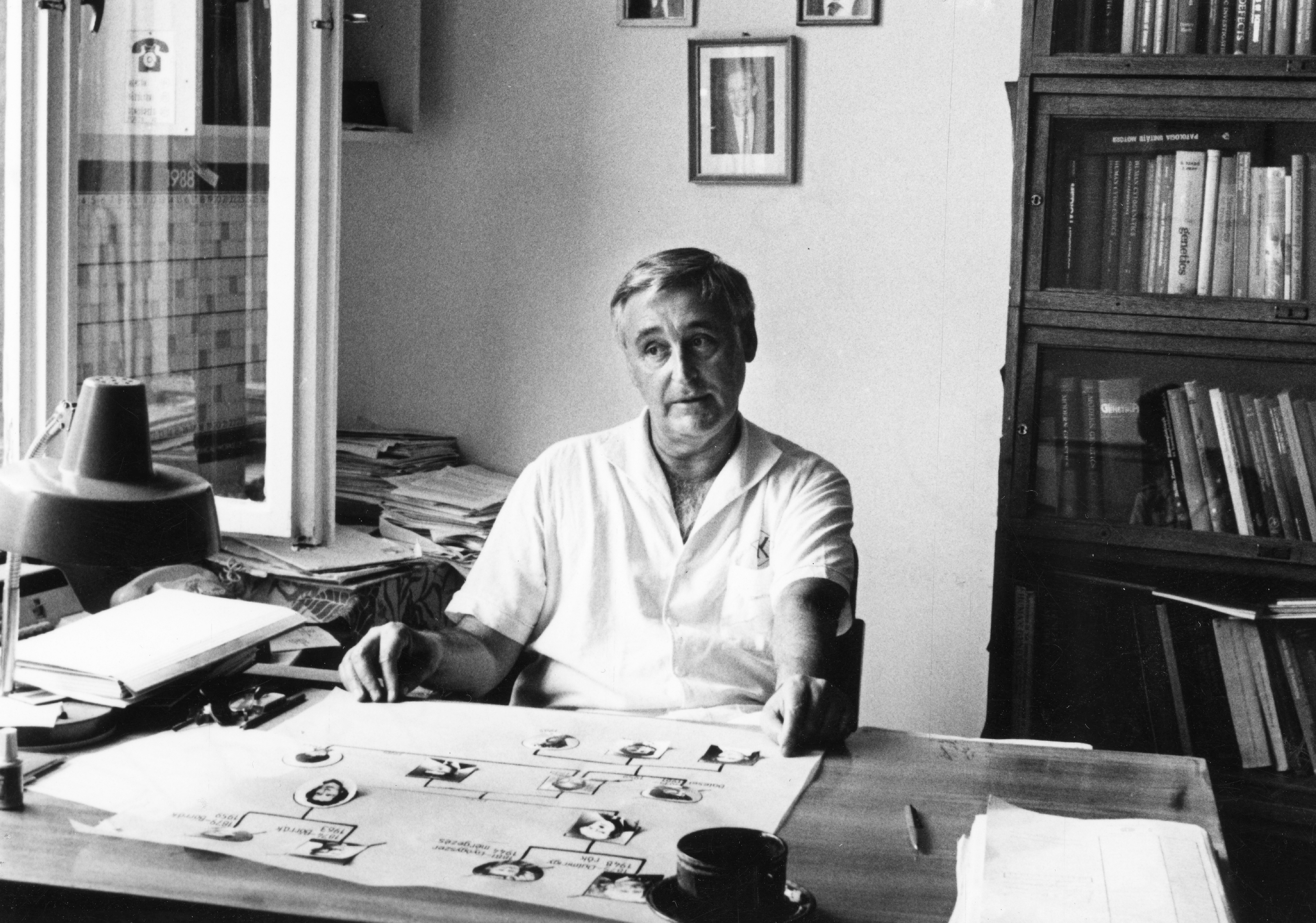 Dr. Czeizel Endre orvos-genetikus 1988-ban